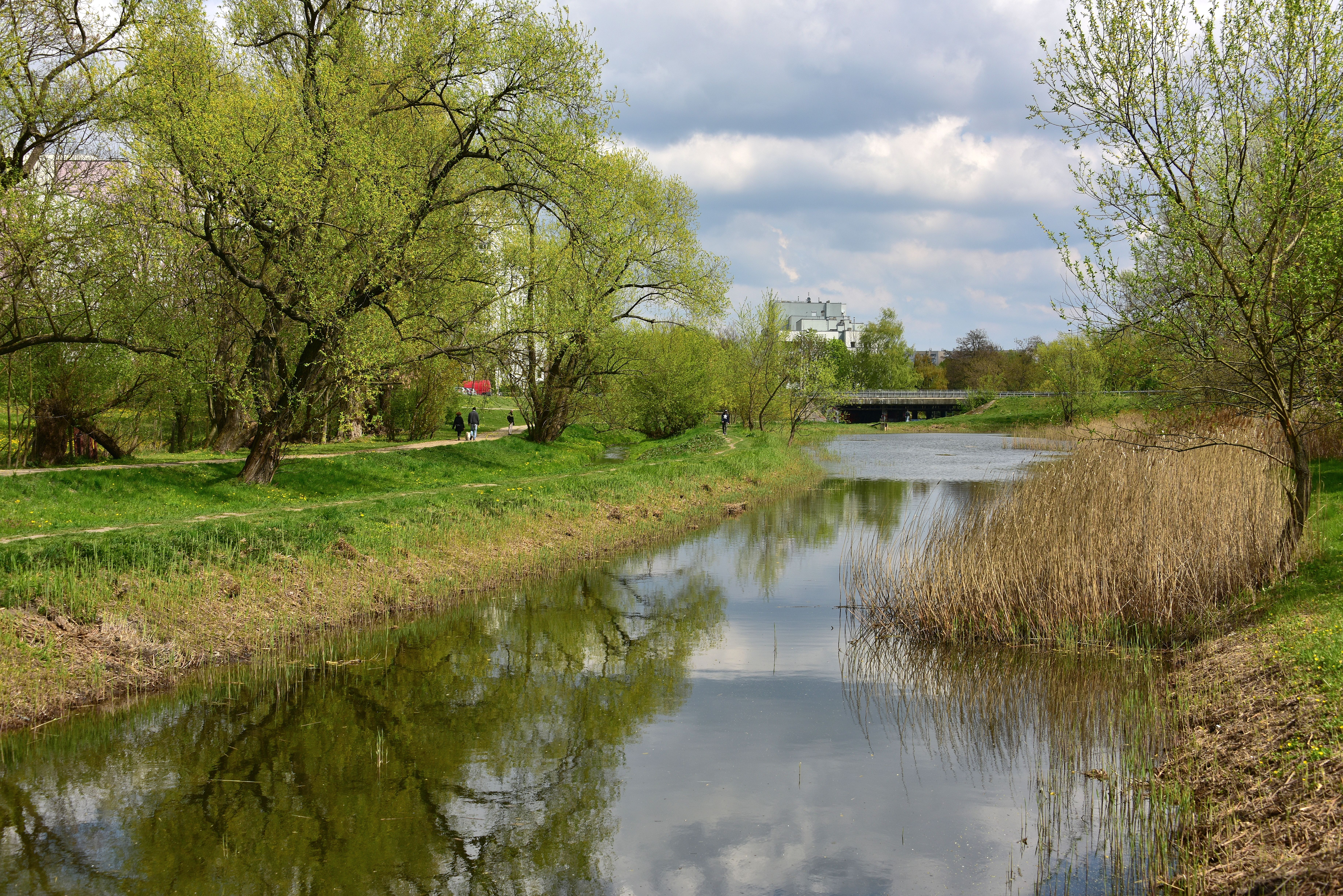 Park Dolinka Służewska w Warszawie